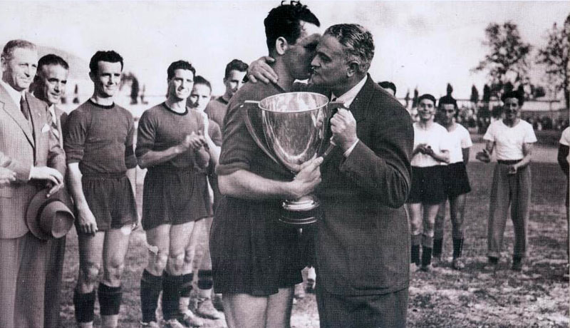 remise de la Coupe d'Italie 1940-41.